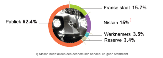 Zelfgemaakt